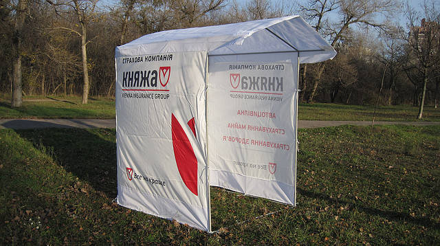 Торгова палатка з друком для промоакції.